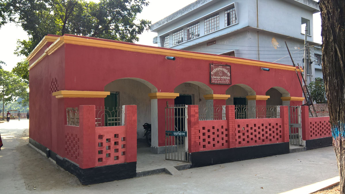 বর্তমানে রাজশাহী কলেজে ৩টি প্লাটুন রয়েছে তন্মধ্যে একটি মহিলা প্লাটুন। উল্লেখ্য যে, রাজশাহী কলেজ বিএনসিসি ইউনিট বি কোম্পানীর সদর দপ্তর।